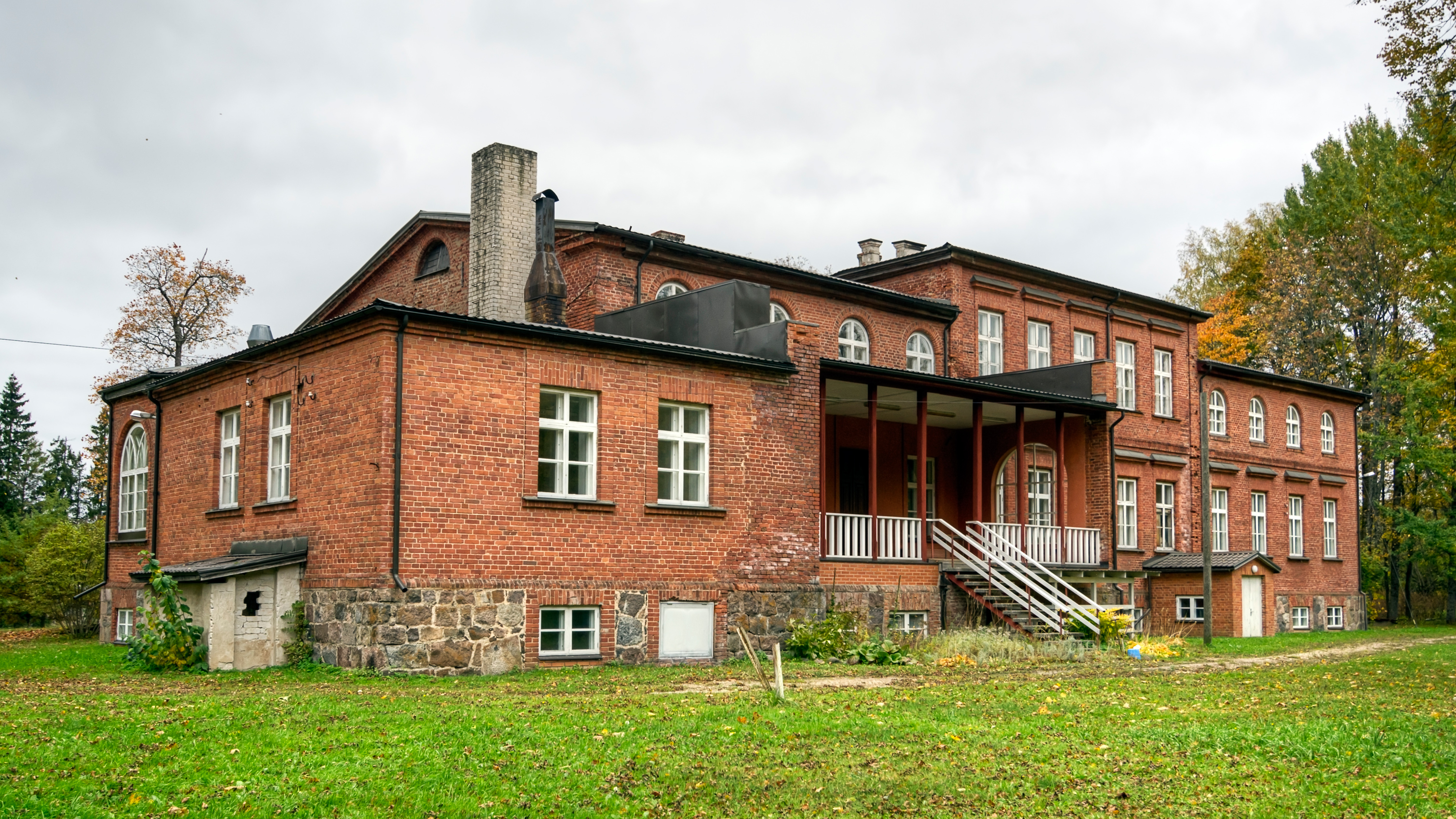 Allikukivi kalevivabriku direktori elamu